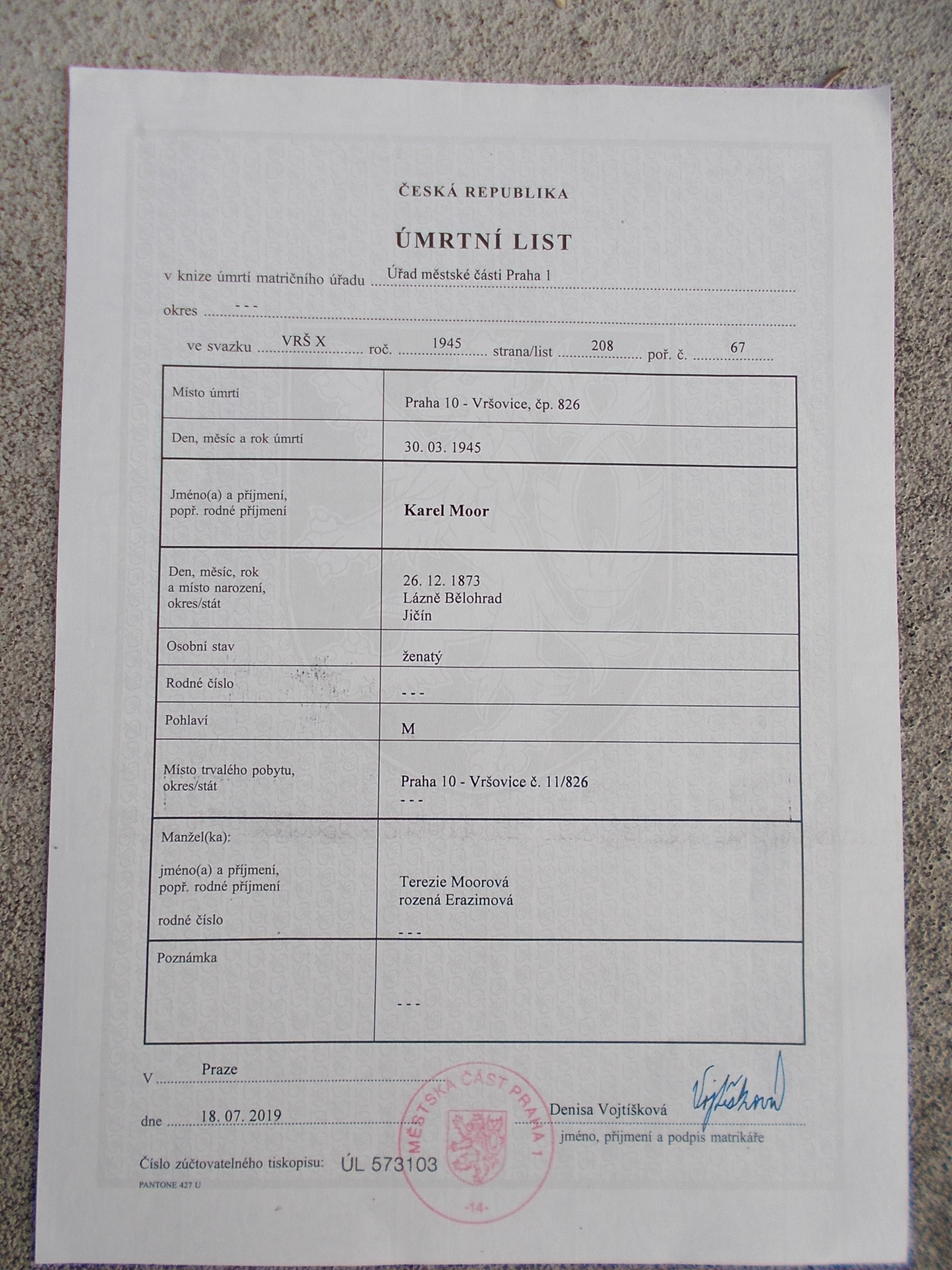 Úmrtní list K.Moora